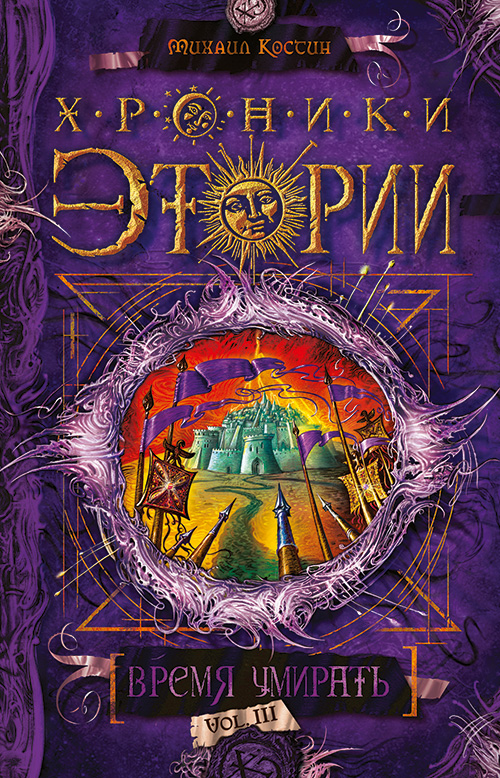 Обложка книги М. Костина «Хроники Этории. Время умирать» 2015 года